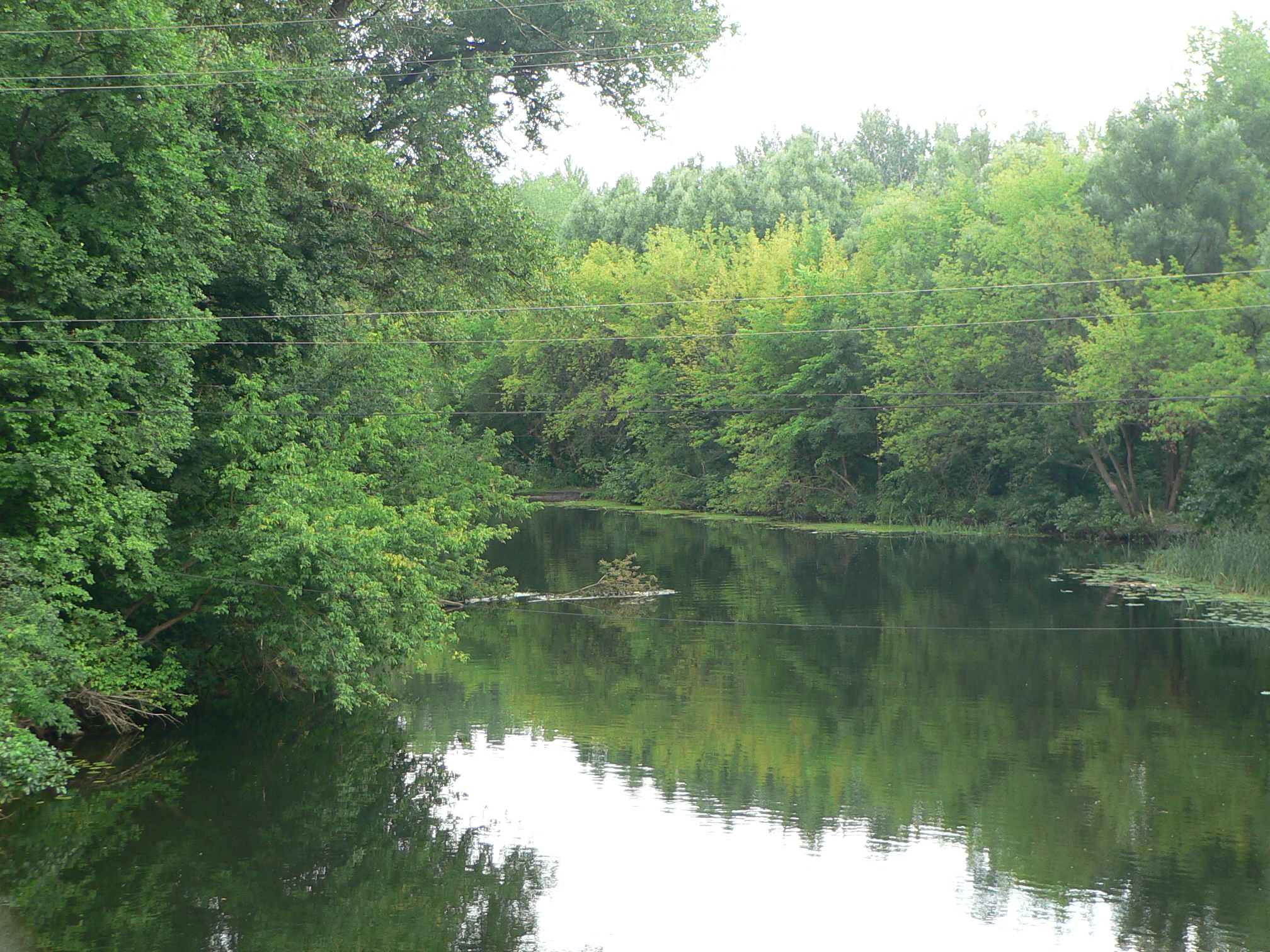 река Лесной Воронеж